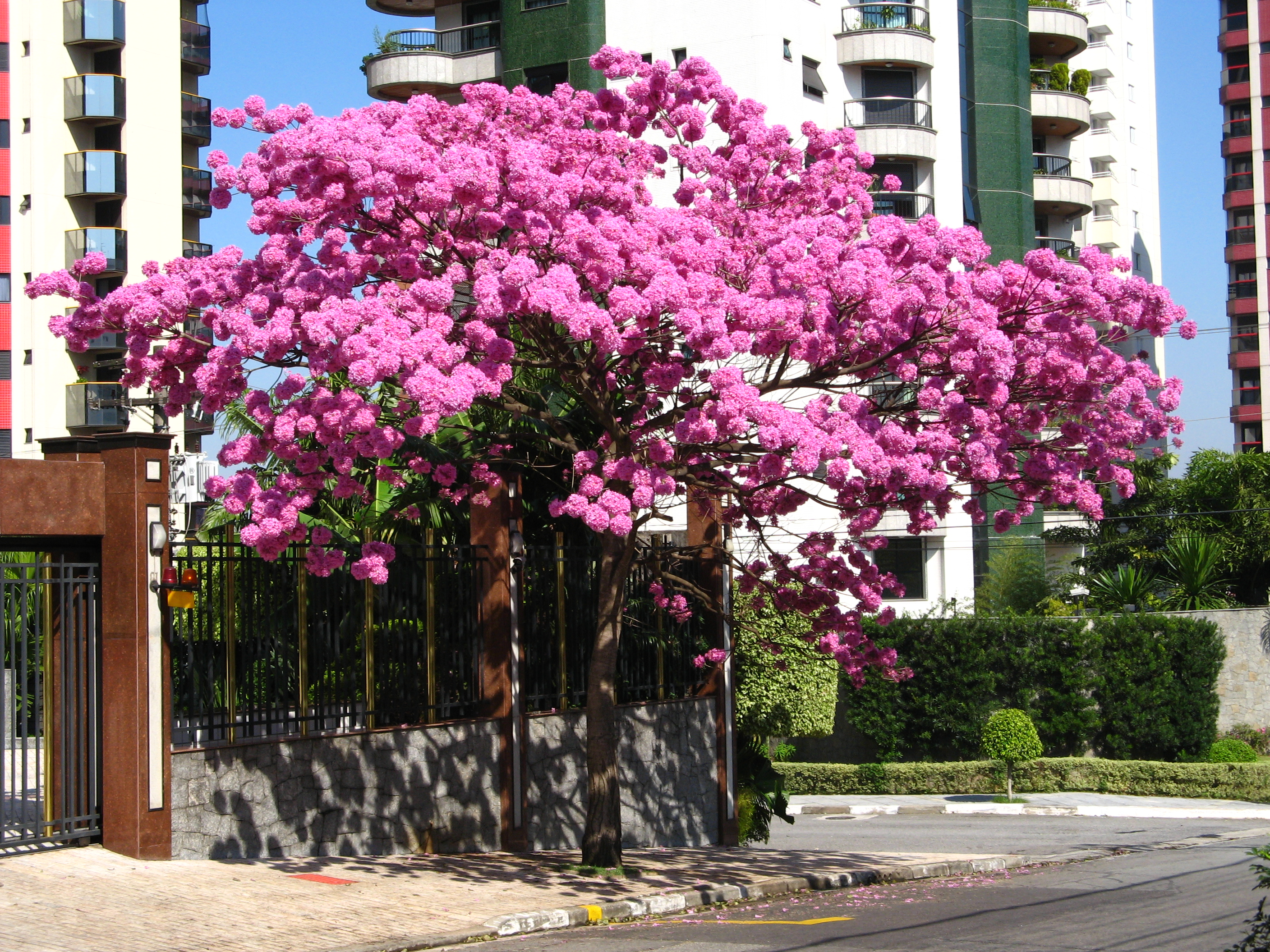 ipe rosa